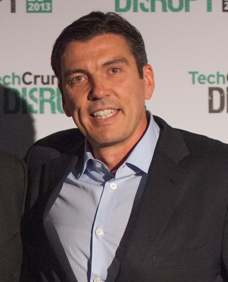 Tim Armstrong at TechCrunch Disrupt 2013 (Day 1 Backstage